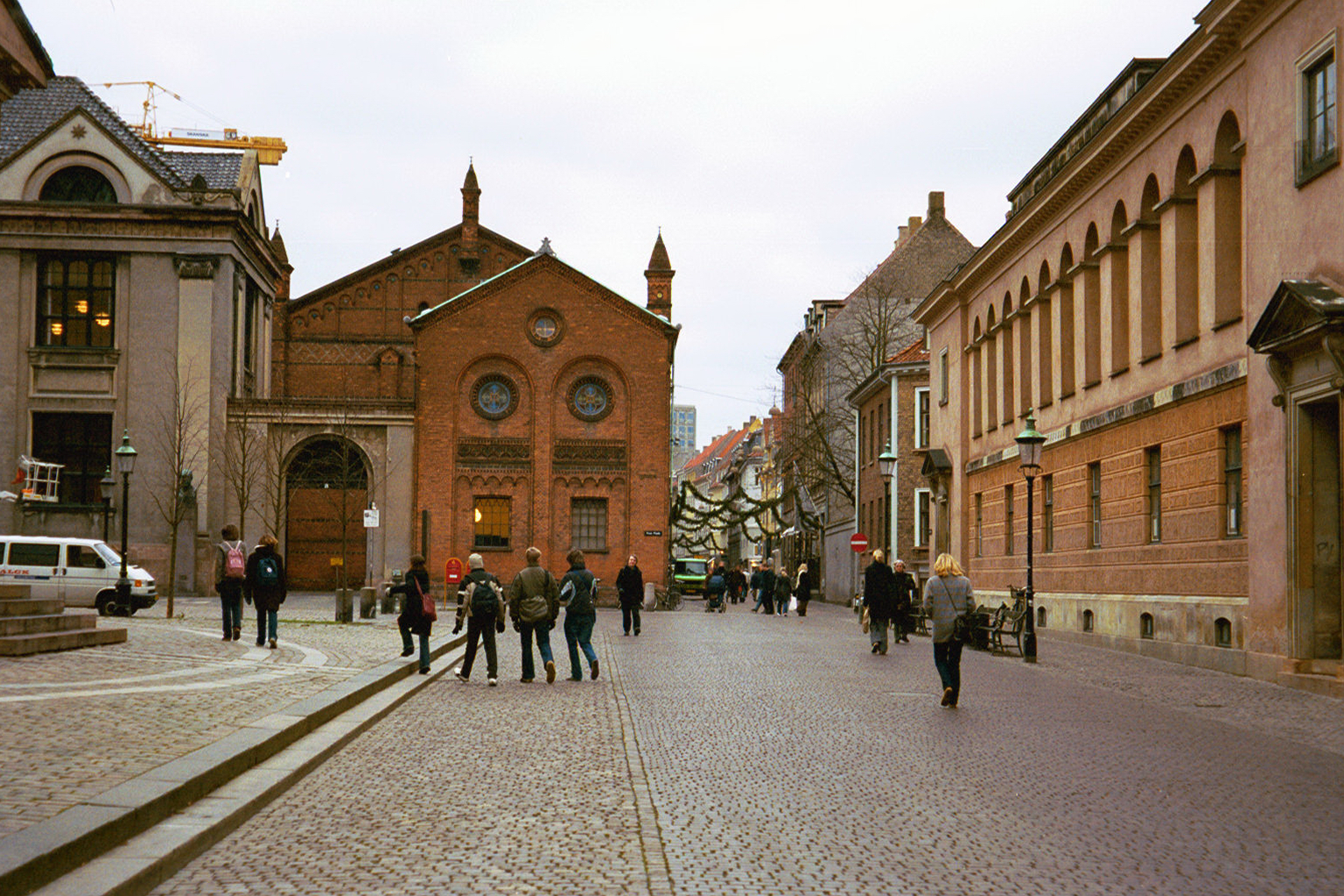 Fiolstræde in Copenhagen, Denmark